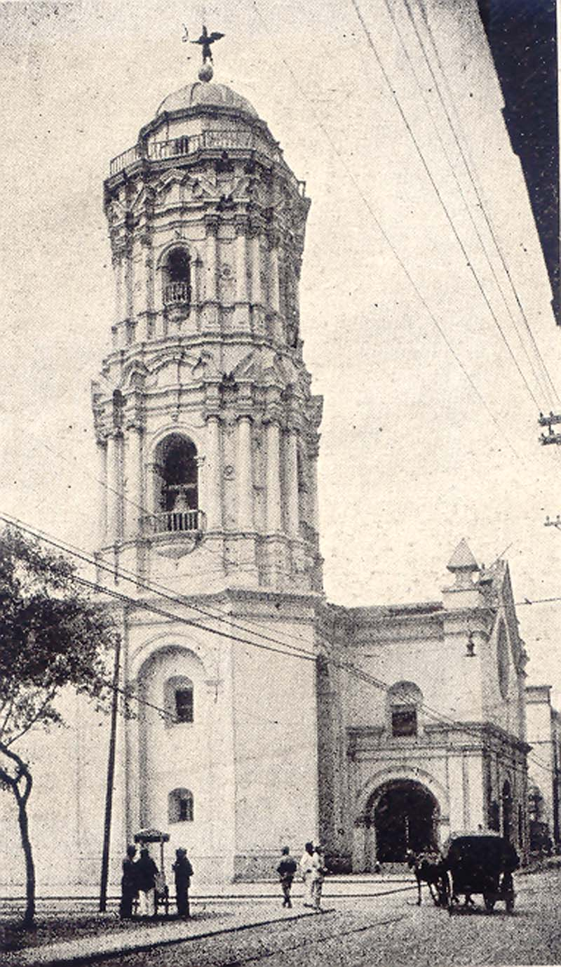 Torre Campanario de la Iglesia de Santo Domingo. La torre ostentaba en la cúspide un ángel de bronce que media 3 metros y medio aproximadamente y se llamaba “El ángel de la Fama”, una leyenda afirmaba que entrada la tarde se izaba hasta la altura de su mano un farol que despedía una luz clara que servía de guía a los navegantes que se acercaban al Callao. Un incendio ocurrido en 1835 lo destruye y es reemplazado por uno de madera.